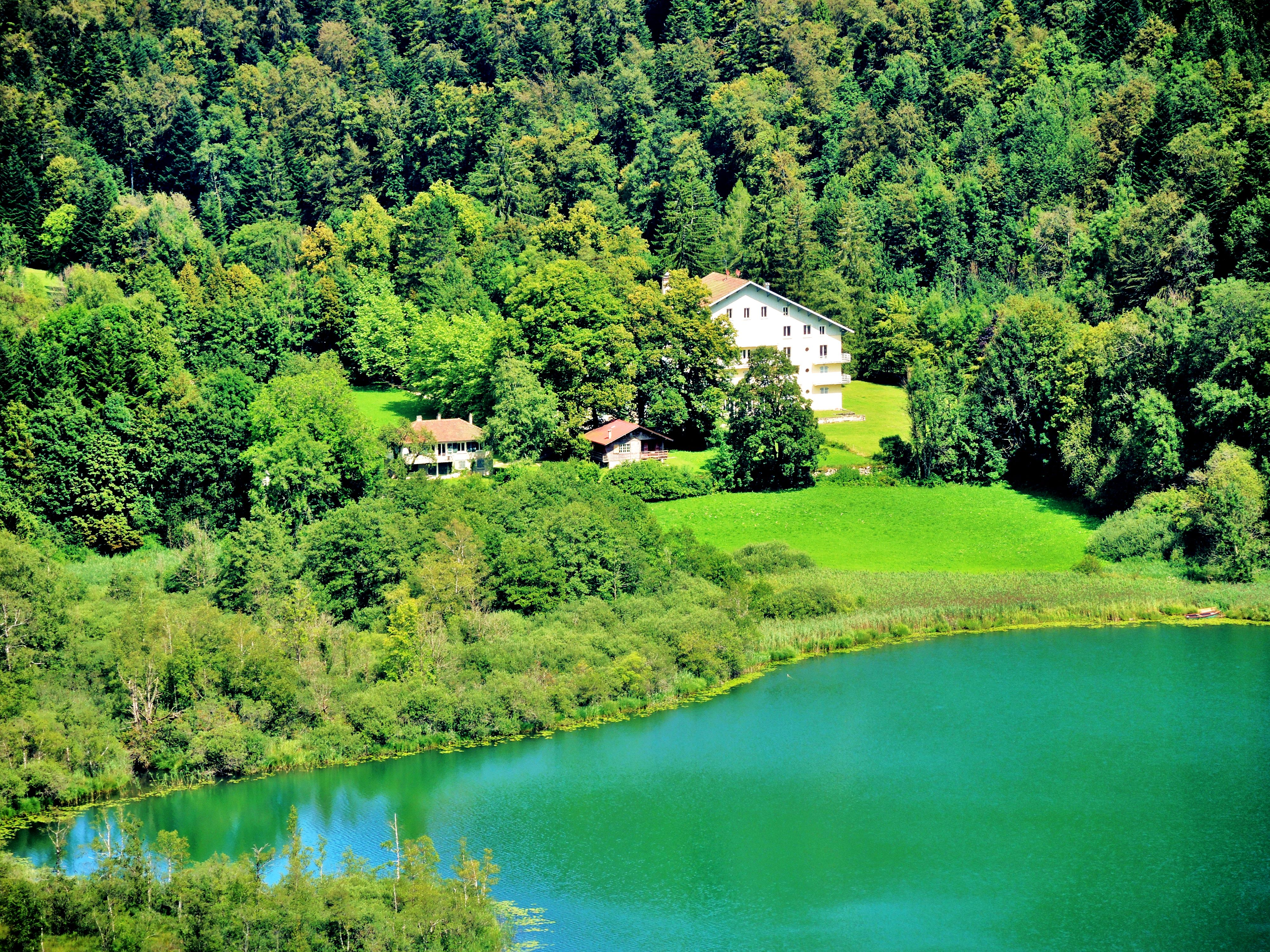 Bâtiment actuel, restant de l'ancienne chartreuse de Bonlieu, vu du belvédère du lac.